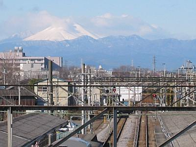 Gunma, 2003